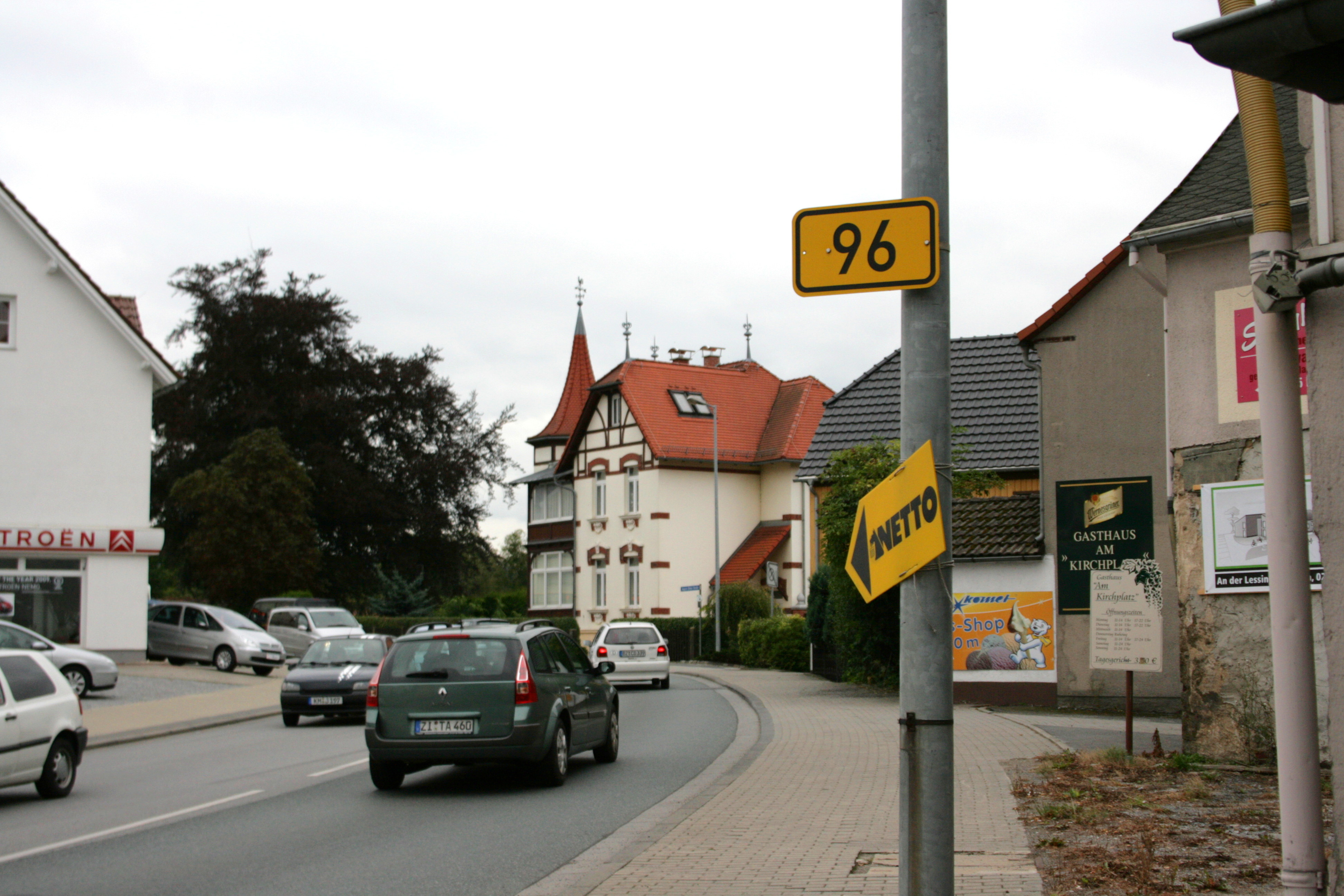 Kirchplatz (Bundesstraße 96) in Großpostwitz